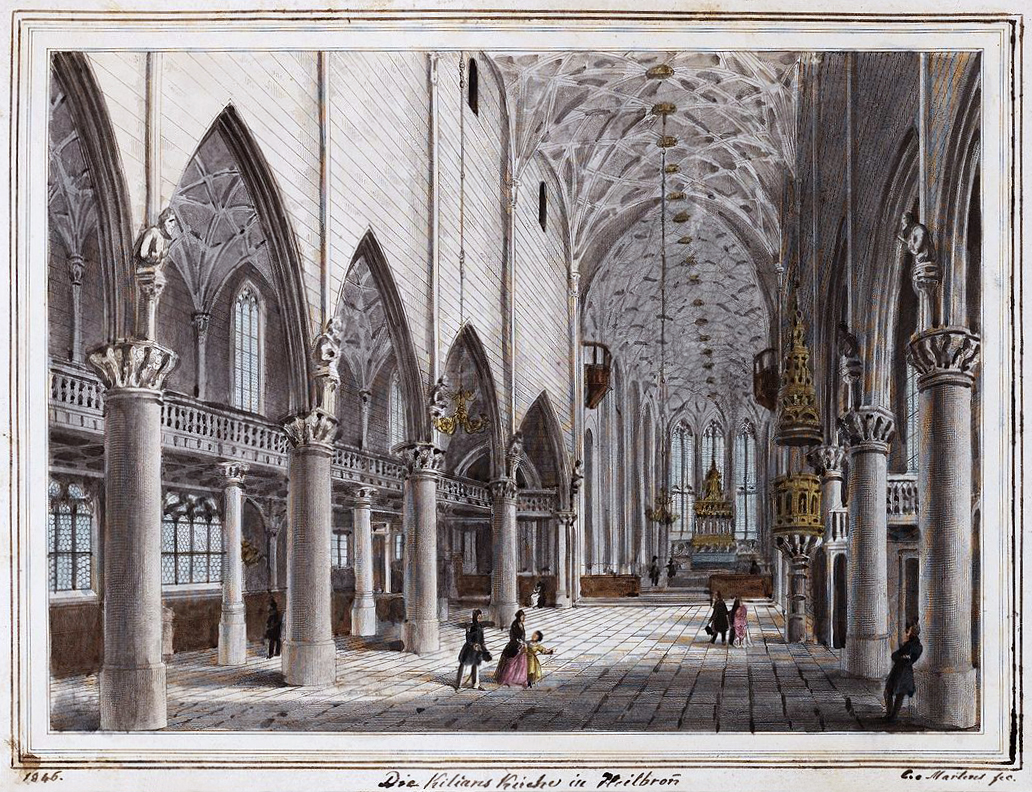 Innenansicht der Kilianskirche in Heilbronn. Lithographie mit Sepia, teilweise aquarelliert, Format: 20,8 × 29 cm